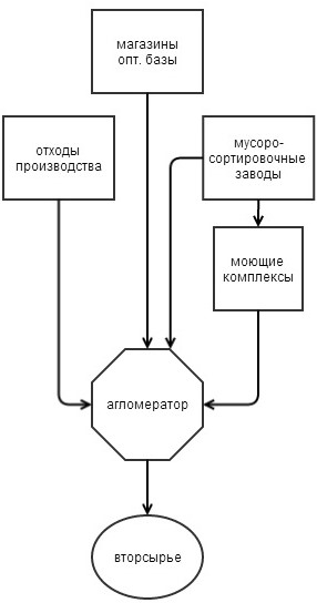 агломератор в цепочке переработки отходов